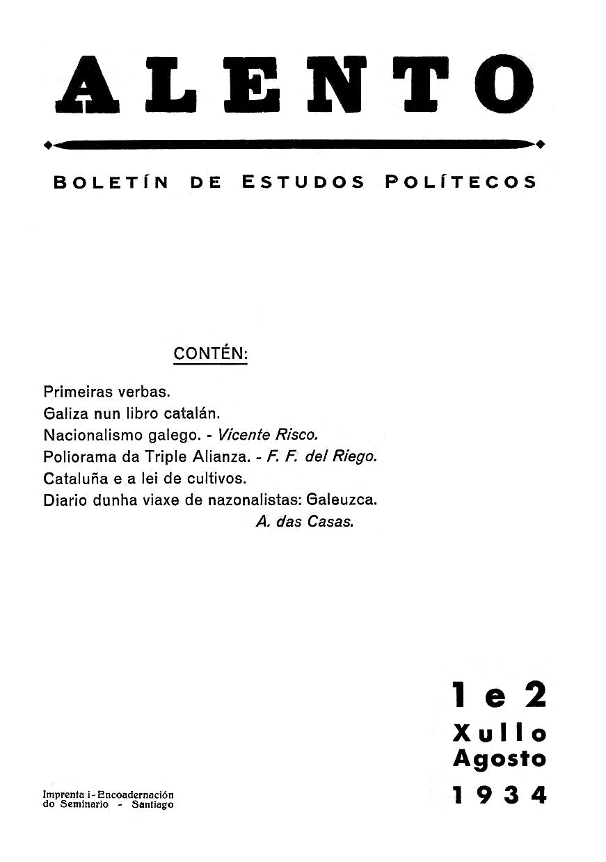 Alento, boletín de estudos polítecos, n 1 e 2, xullo agosto de 1934